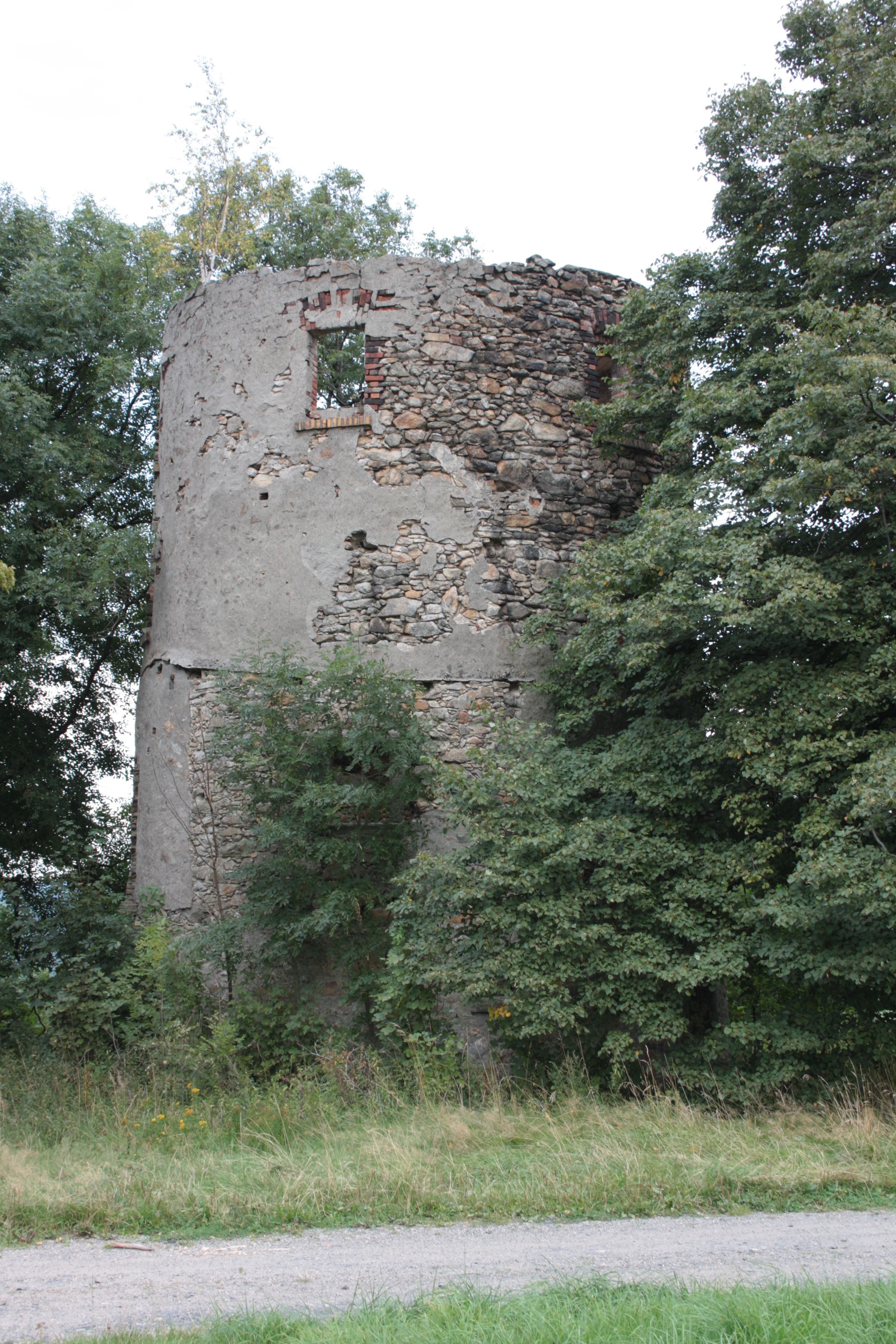 This photograph was taken with a DSLR from WMCZ's Camera grant. Ruiny větrného mlýna na Lysém vrchu u Vysokého, součásti Heřmanic v Libereckém kraji.